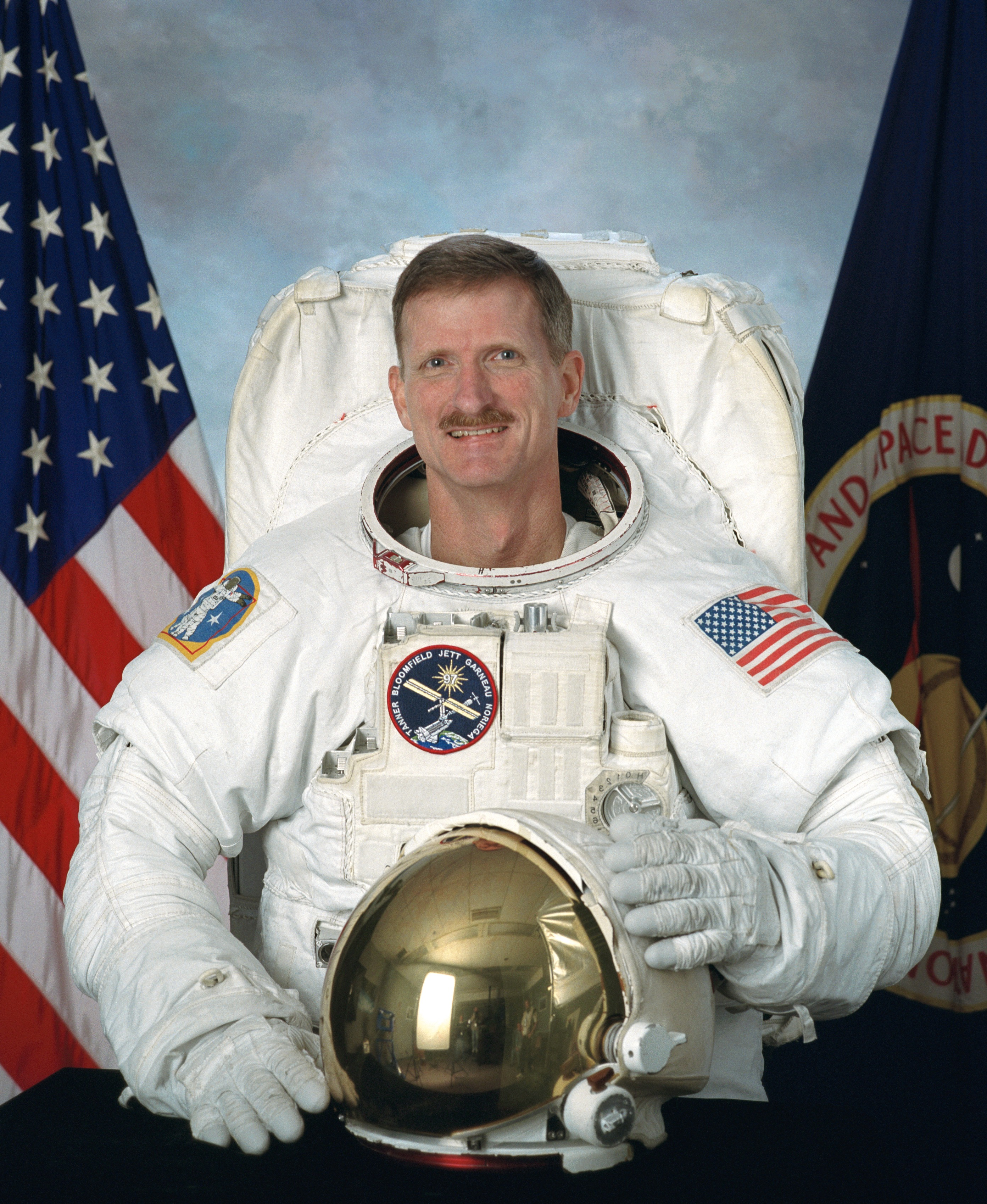 portrait astronaut Joseph Tanner